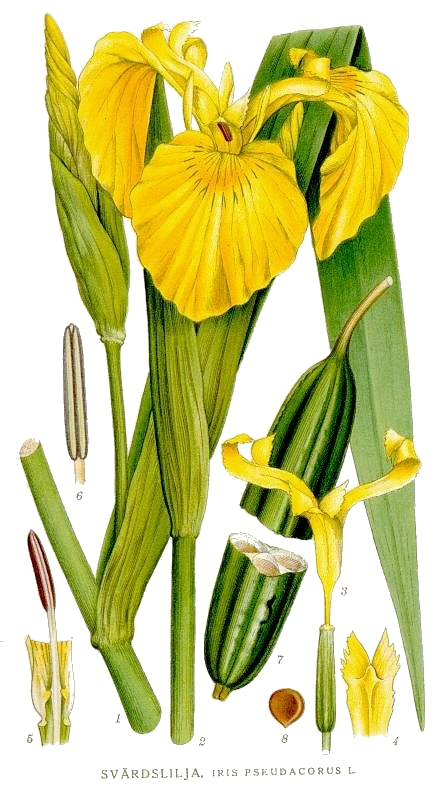 Iris pseudacorus L. Original Description Svärdslilja, Iris pseudacorus L.